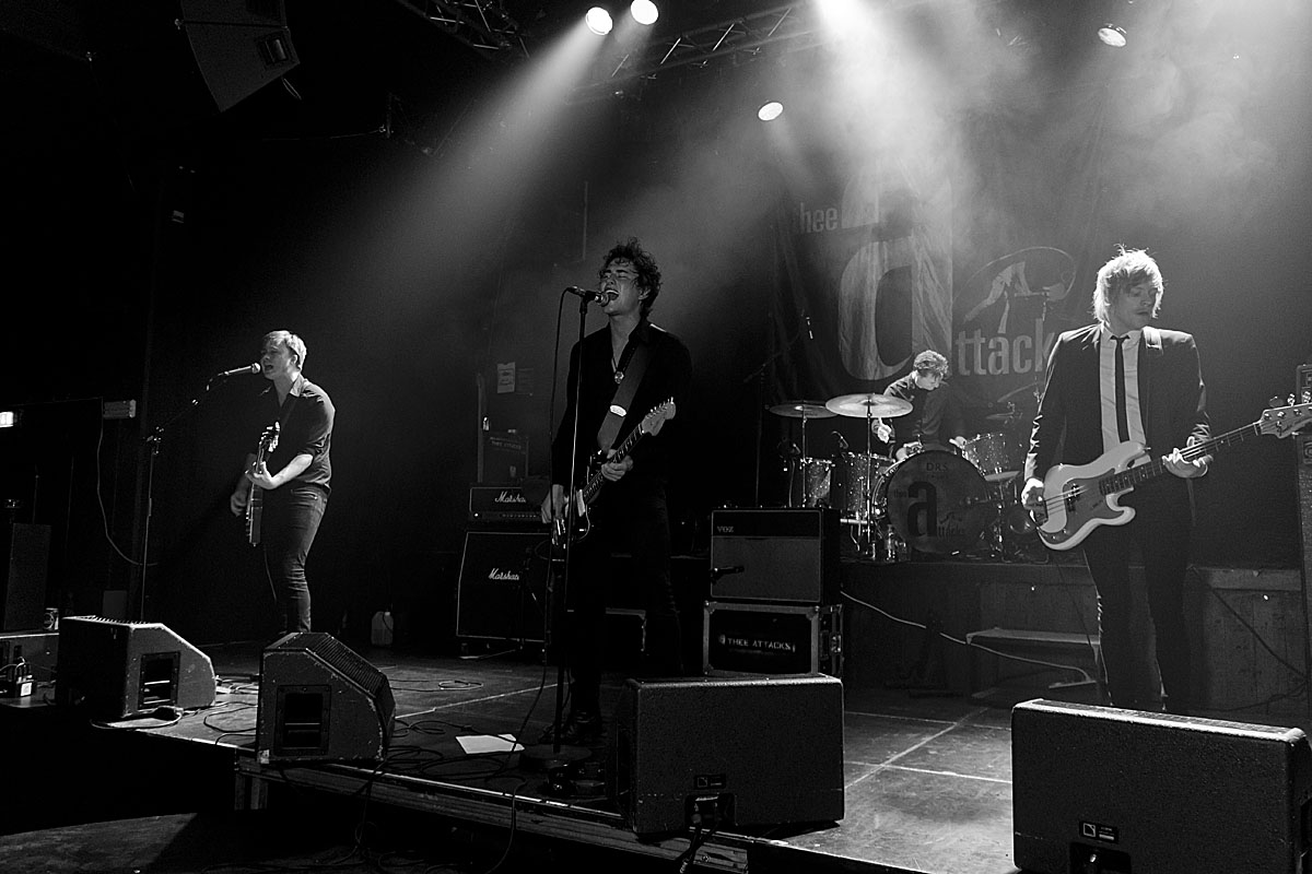 Thee Attacks ved en koncert på spillestedet Forbrændingen i Albertslund den 10. november 2012